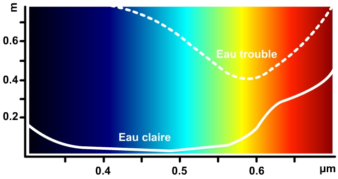 Coefficient d'atténuation de la lumière en fonction de l'eau longueur d'onde, dans l'eau clair et trouble